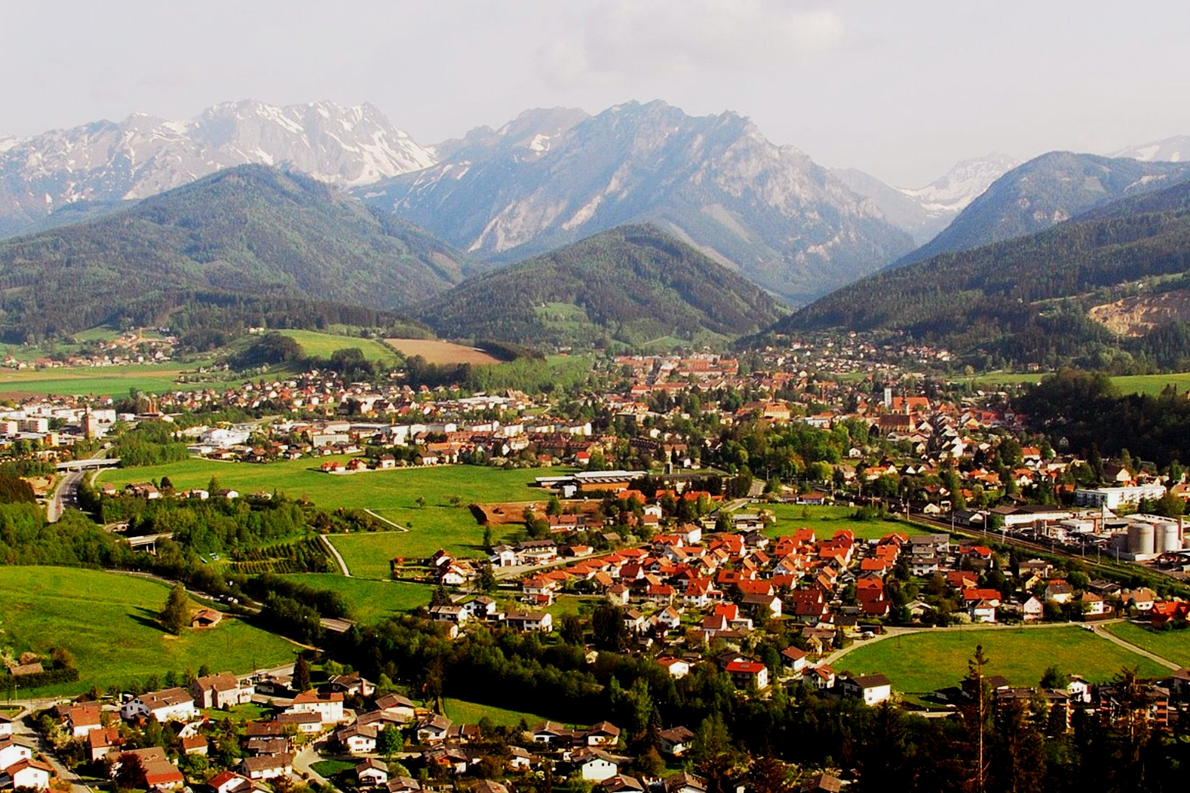 Teilansicht von Trofaiach - im Hintergrund die Eisenerzer Alpen -- links hinten Eisenerzer Reichenstein, davon rechts Vordernberger Mauer